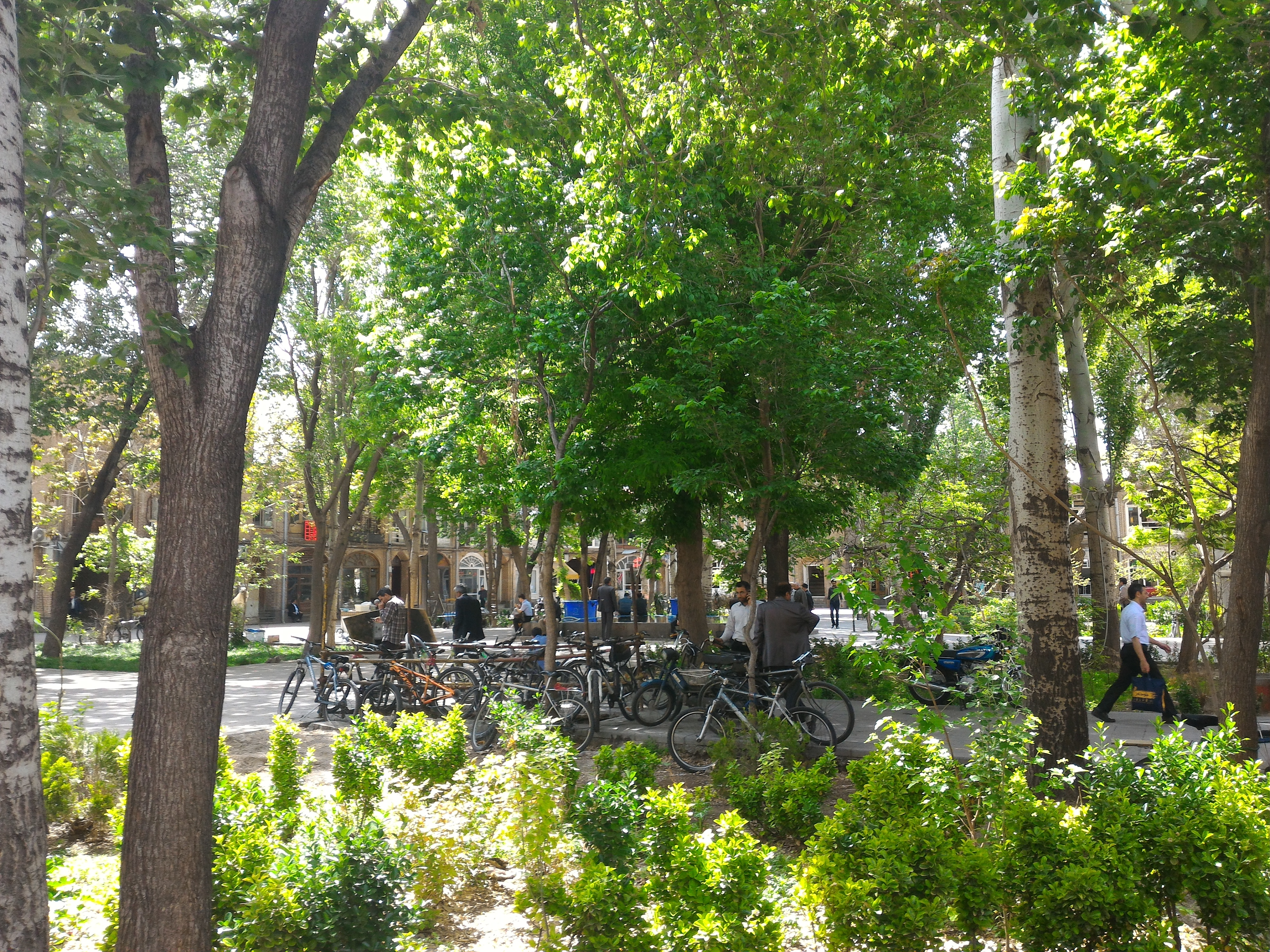 بازار تبریز، تیمچه امیر